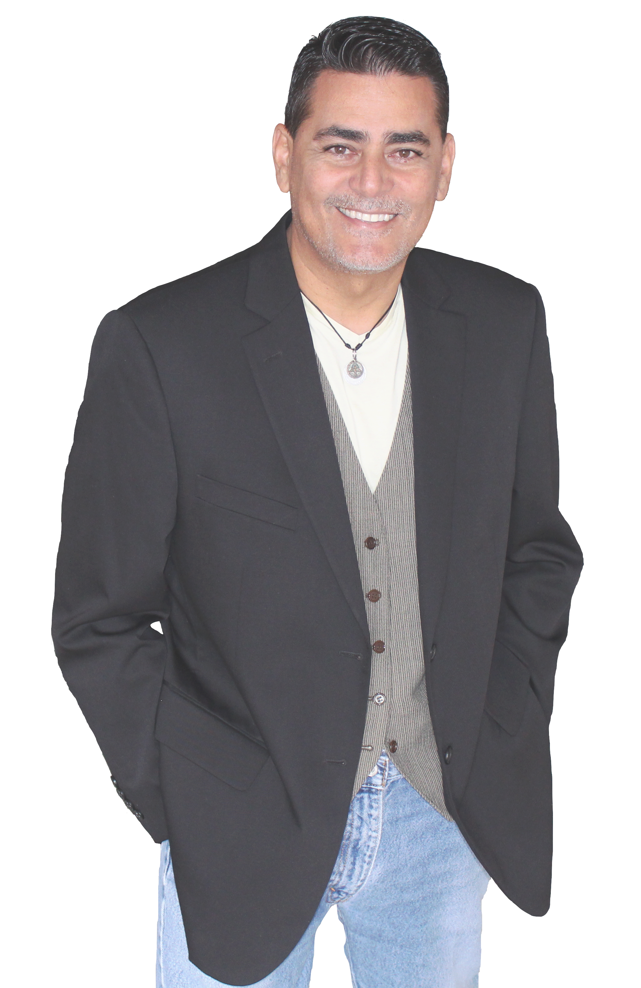 Raul Alberto Diaz Periodista Internacional